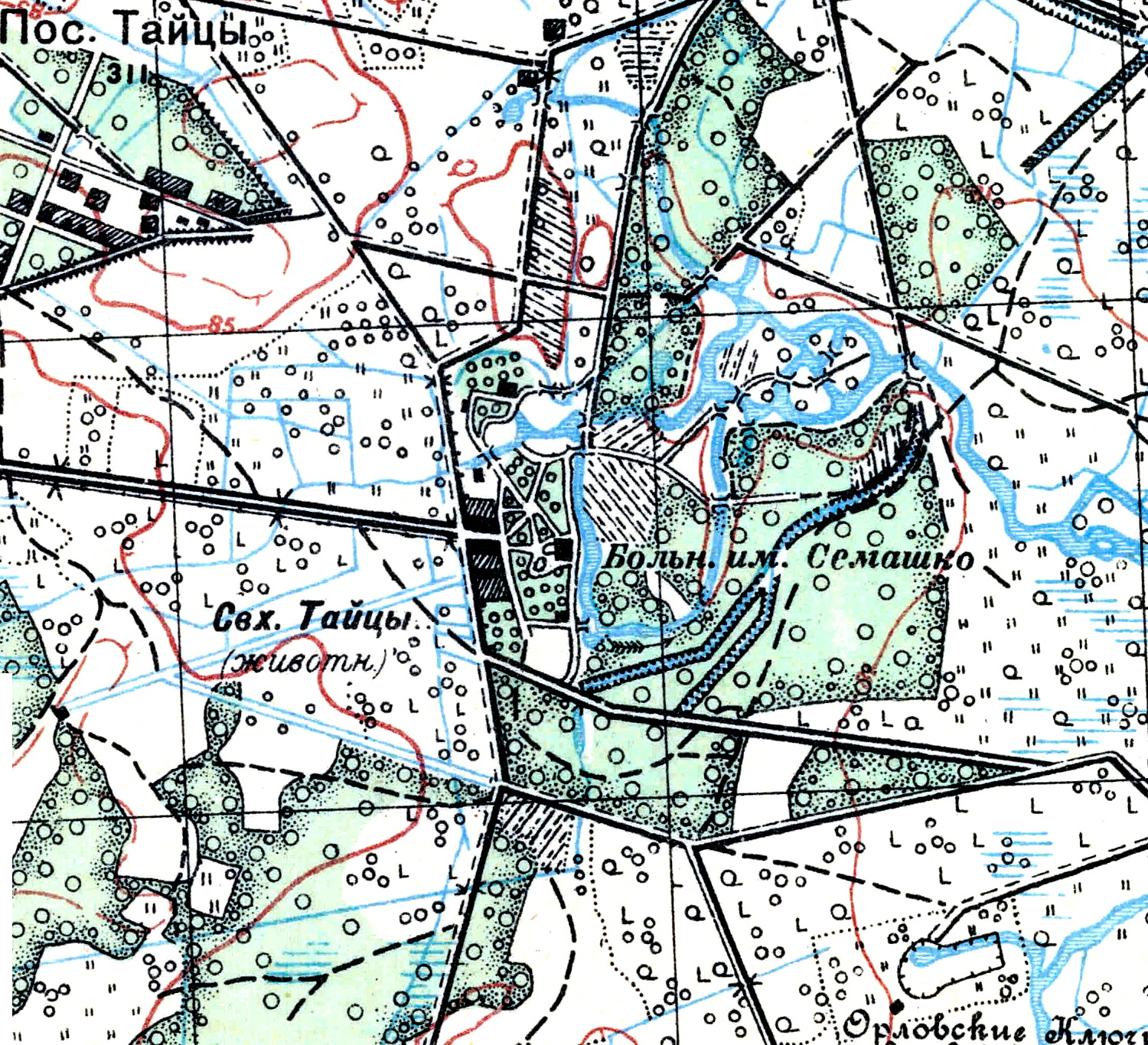 Топографическая карта Ленинградской области, квадрат О-36-13-А-б (Пос. Тайцы), посёлок Тайцы